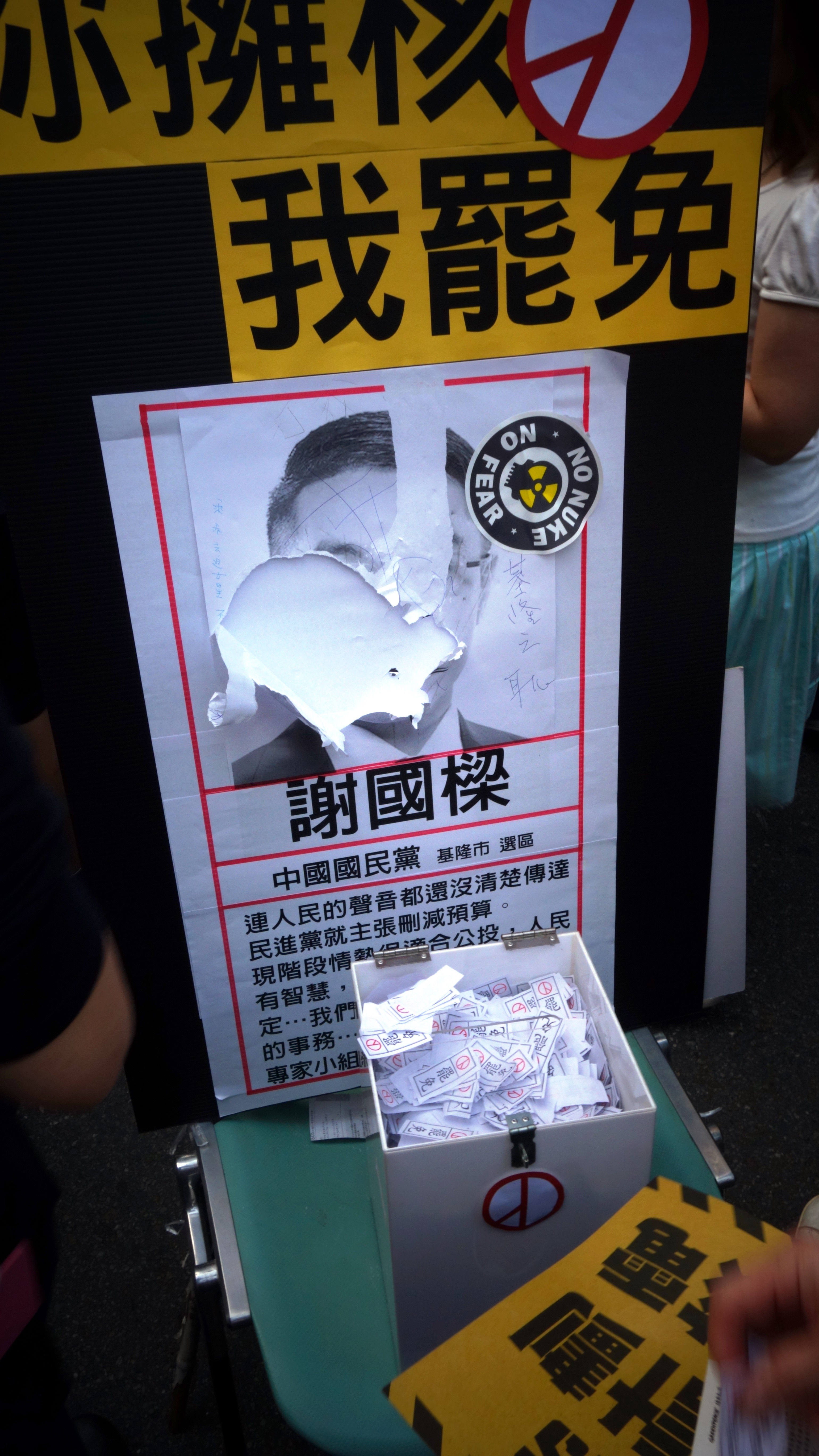 2013.3.9反核行動劇諷刺抨擊基隆市中國國民黨立委謝國樑